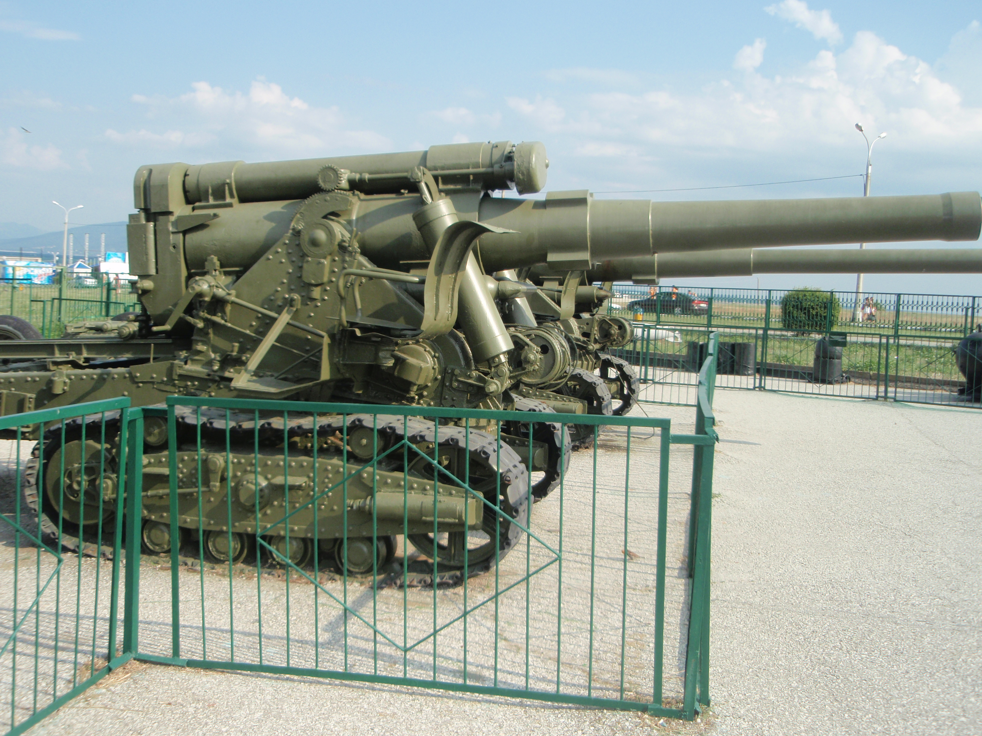 Советская 152-мм пушка большой мощности Бр-2 (вид с правого борта) (г.Новороссийск)